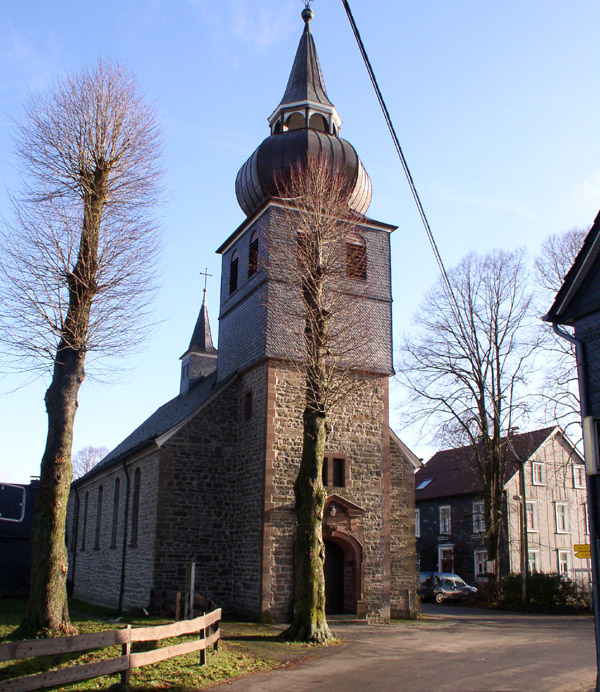 Egen, Wipperfürth, 2004 selbst fotografiert, GFDL